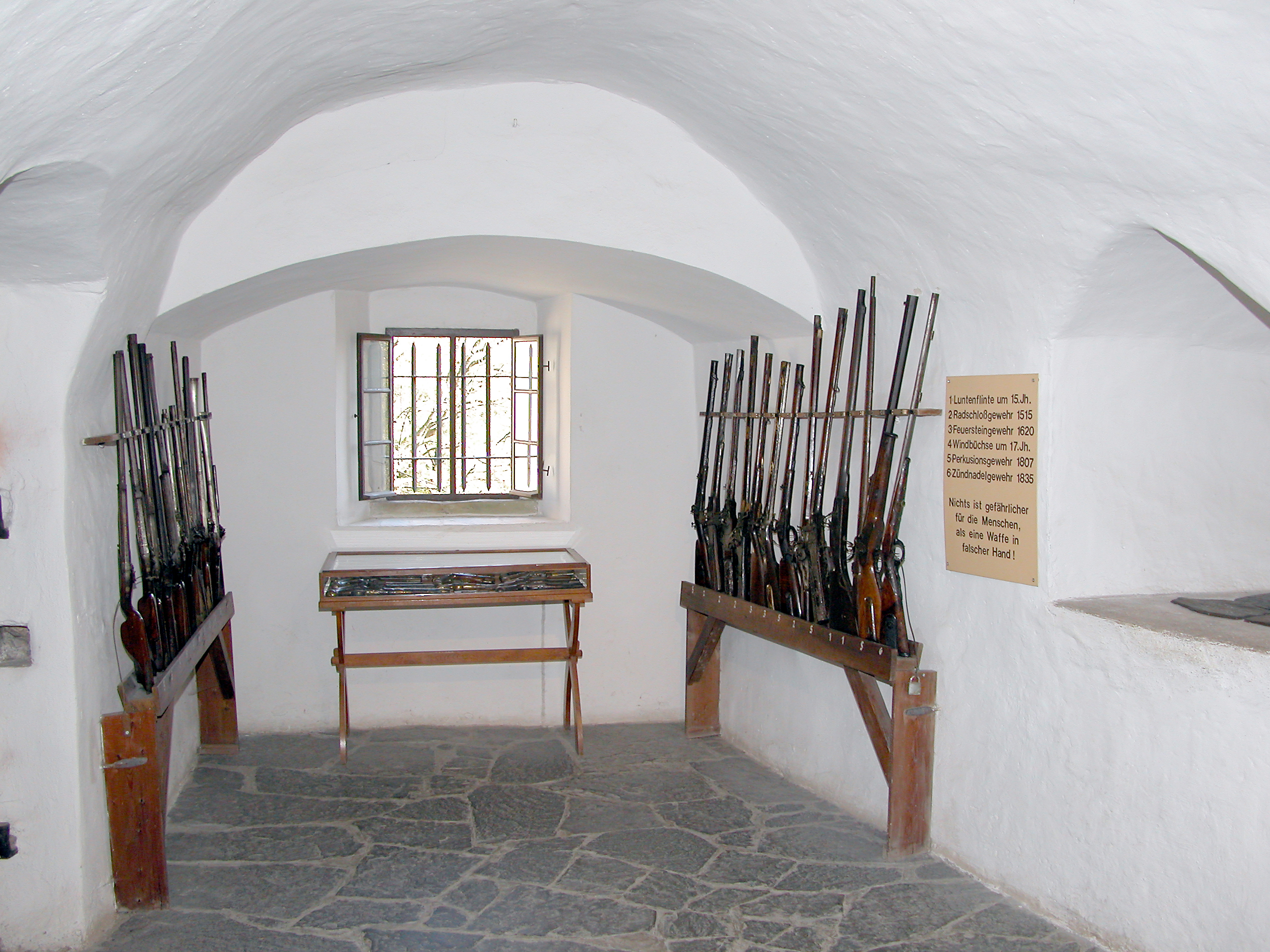 16.10.2007 08118 Stein (Hartenstein), Stein 1: Burg Stein (ab 12. Jh.). Museumsraum im Obergeschoß. [DSCN30801.TIF]20071016635DR.JPG(c)Blobelt